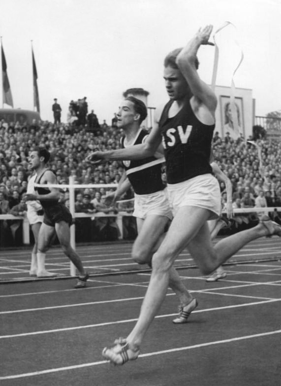 Zentralbild Funck 7 Mot. 14.10.1955 Harbig-Gedächtnis-Sportfest in Dresden Am Sonntag, dem 9. Oktober 1955, traf sich ein Großteil der europäischen Leichtathletik-Elite zum Rudolf-Harbig-Gedenksportfest in Dresden, 35.000 Zuschauer sahen packende Kämpfe und im wichtigsten Wettbewerb, dem 800-m-Lauf, einen erneuten Sieg des Dänen Gunnar Nielsen. Eine weitere herausragende Leistung war der neue deutsche Rekord in der 4x100-m-Frauenstaffel, den Motor Jena mit 46,9 Sek. erzielte. UBz: Zielbild des 100-m-Laufes der Herren. Manfred Germar (ASV Köln) siegte überlegen vor dem Hallenser Studenten [Manfred] Steinbach (zweiter von rechts).